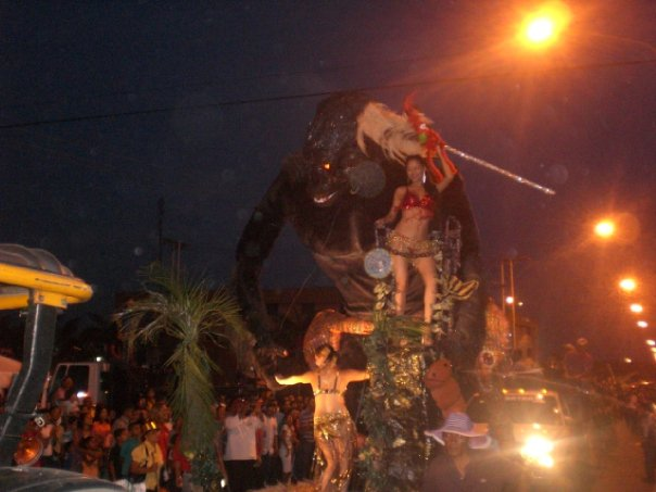 carnaval pariaguan